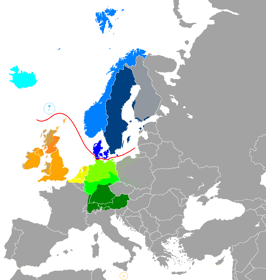 Español Lenguas nórdicas Islandés Feroés Noruego nynorsk Noruego bokmål Sueco Danés Lenguas germánicas occidentales Escocés Inglés Frisón Neerlandés Bajo alemán Alto alemán inferior Alto alemán superior English North Germanic languages Icelandic Faroese Norwegian nynorsk Norwegian bokmål Swedish Danish West Germanic languages Scots (Anglo-Frisian, West Germanic) English (Anglo-Frisian, West Germanic) Frisian (Anglo-Frisian, West Germanic) Dutch (Low Franconian, West Germanic) Low German (West Germanic) Central German (High German, West Germanic) Upper German (High German, West Germanic) Esperanto Okcidentnordĝermana: Islanda Feroa Norvega nynorsk Norvega bokmål Orientnordĝermana Sveda Dana Okcidentaj ĝermanaj lingvoj Skota (Anglo-Frisa, Okcidentĝermana) Angleca (Anglo-Frisa, Okcidentĝermana) Frisa (Anglo-Frisa, Okcidentĝermana) Malalta franka (Okcidentĝermana) Malalta germana (Okcidentĝermana) Centra germana (Altgermana, Okcidentĝermana) Supra germana (Altgermana, Okcidentĝermana) Deutsch Nordgermanische Sprachen Isländisch Färöisch Norwegisch nynorsk Norwegisch bokmål Schwedisch Dänisch Westgermanische Sprachen Scots (Anglo-Friesisch, Westgermanisch) Englisch (Anglo-Friesisch, Westgermanisch) Friesisch (Anglo-Friesisch, Westgermanisch) Niederländisch (Niederfränkisch, Westgermanisch) Niederdeutsch (Westgermanisch) Mitteldeutsch (Hochdeutsch, Westgermanisch) Oberdeutsch (Hochdeutsch, Westgermanisch)